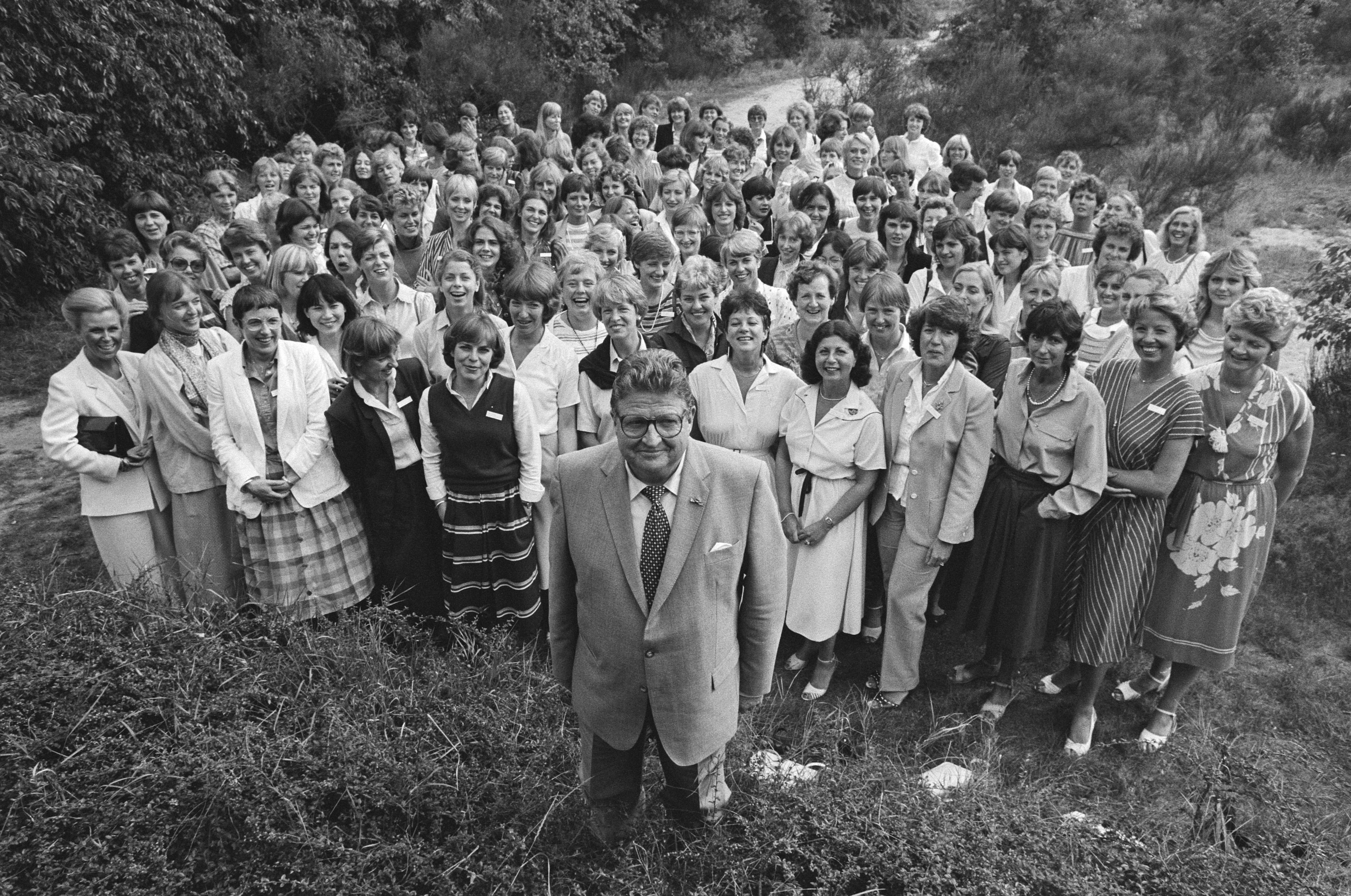 Collectie / Archief : Fotocollectie Anefo Reportage / Serie : Reünie van "Sweet Sixteen" in Hilversum Beschrijving : Oprichter en dirigent Lex Karsemijer met 135 oud-koorleden Datum : 11 september 1982 Locatie : Hilversum, Noord-Holland Trefwoorden : dirigenten, groepsportretten, koren Persoonsnaam : Karsemeijer, Lex Fotograaf : Bogaerts, Rob / Anefo Auteursrechthebbende : Nationaal Archief Materiaalsoort : Negatief (zwart/wit) Nummer archiefinventaris : bekijk toegang 2.24.01.05 Bestanddeelnummer : 932-3213